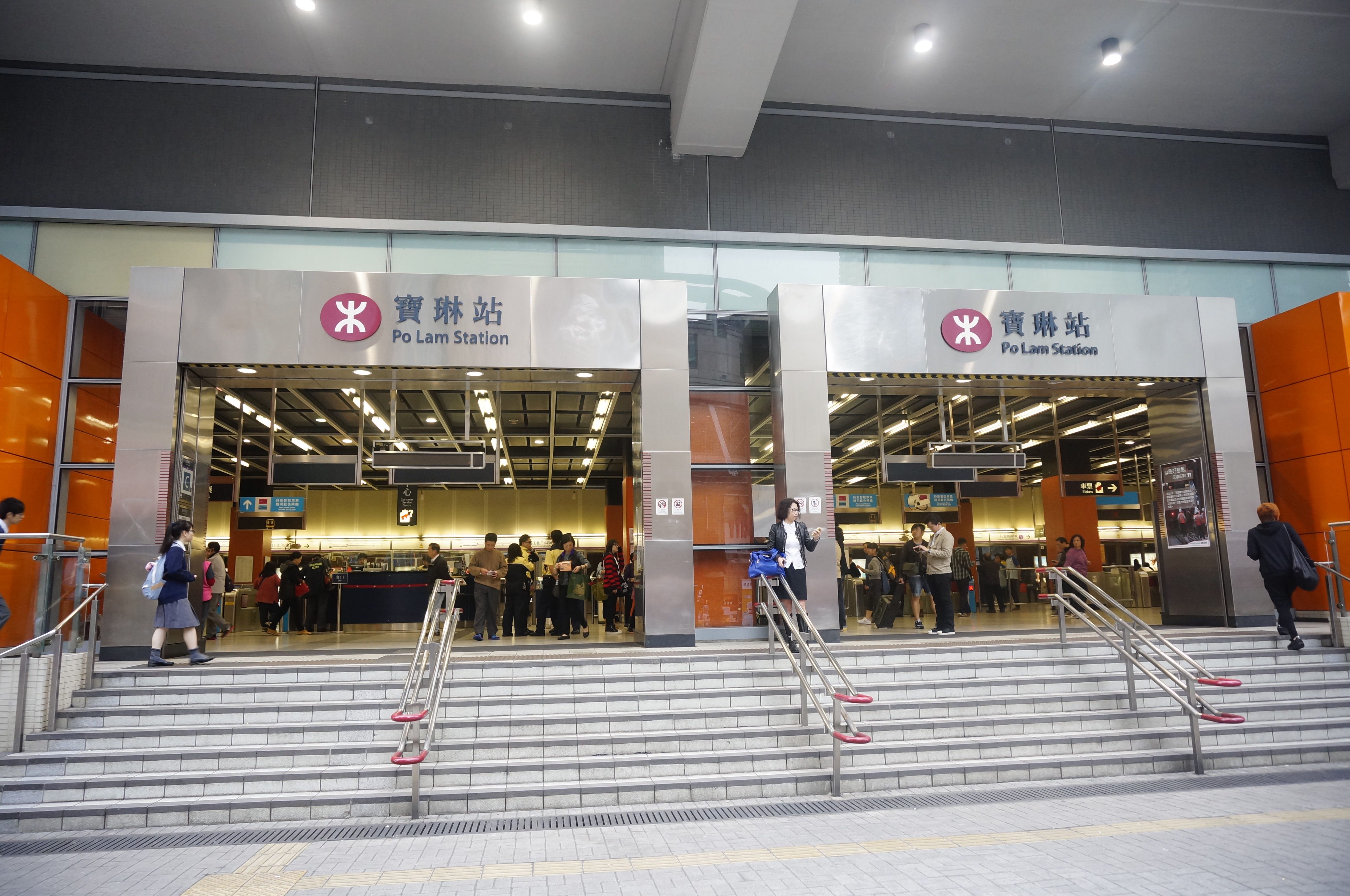 港鐵寶琳站C出入口